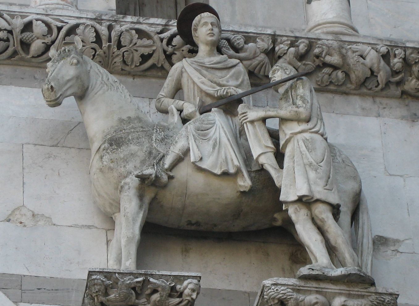 Saint Martin de Tour - illustration très courante: partageant son manteau avec un pauvre. Ici, façade du Duomo de Lucca, Toscane, Italie.